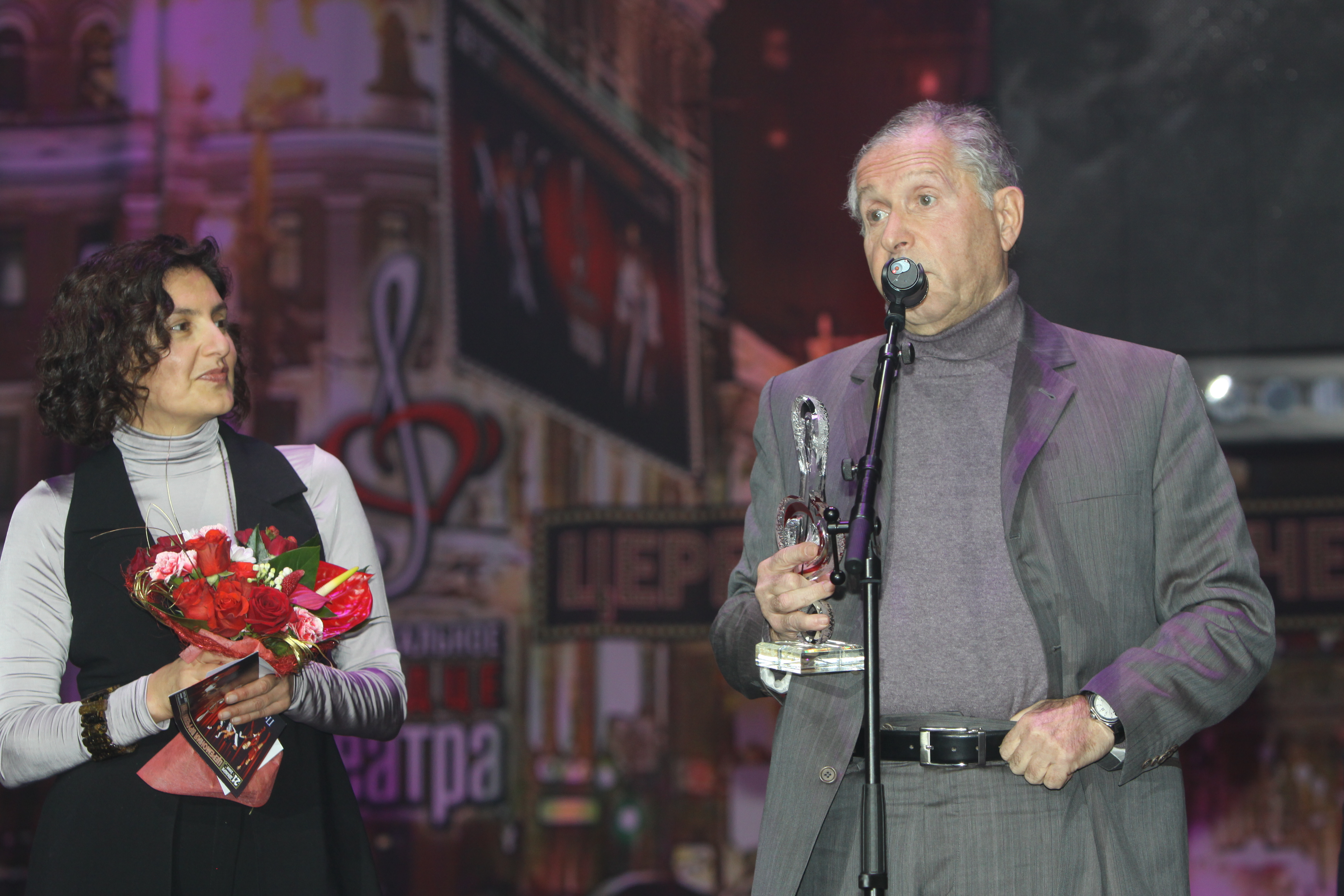 Галина Полиди и Юрий Ряшенцев на церемонии вручения премии "Музыкальное сердце театра", 2009